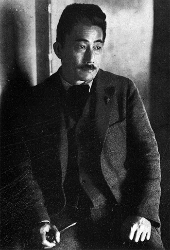 Portrait of Osanai Kaoru (小山内薫, 1881 – 1928)